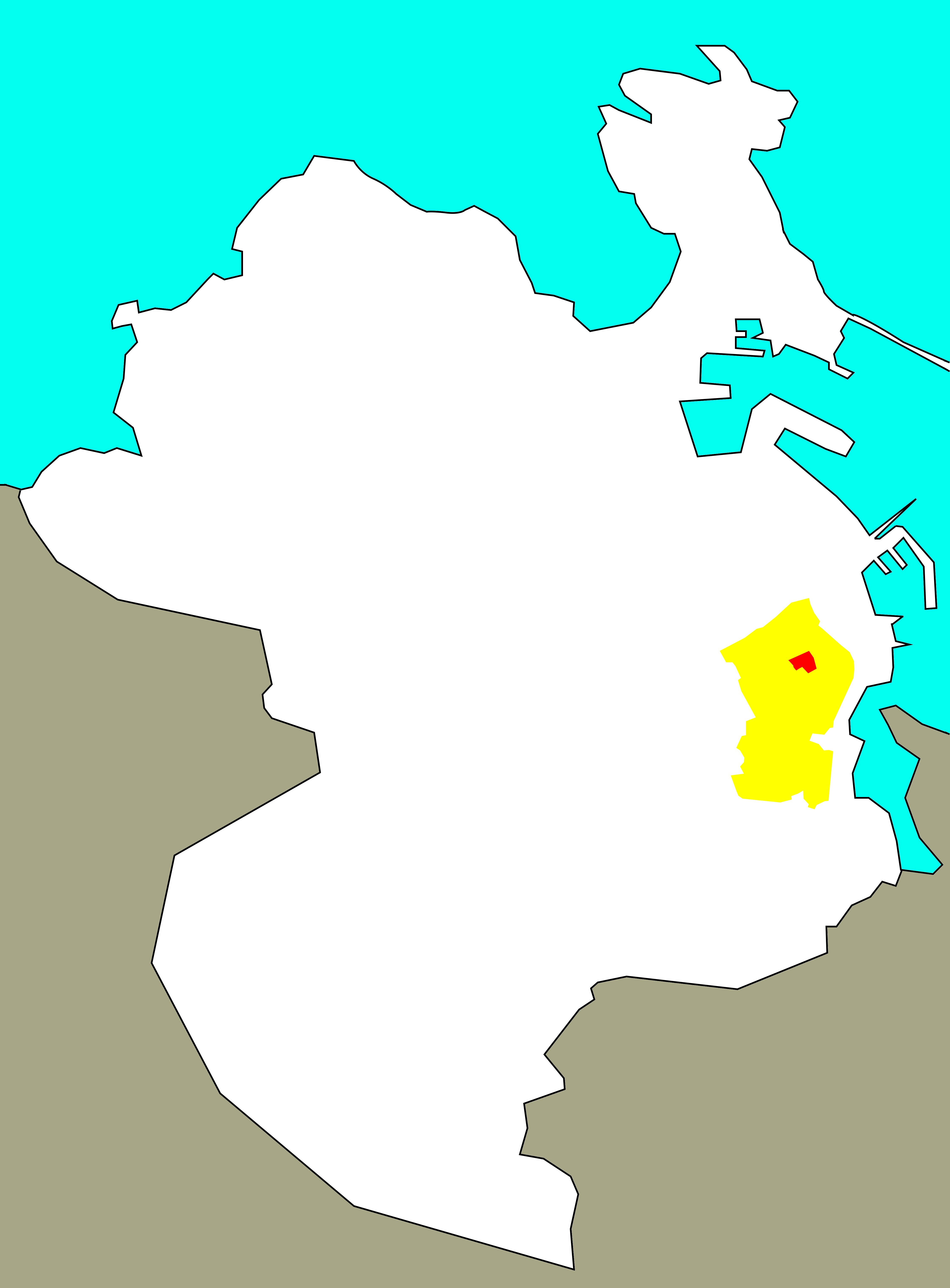 Situación da Madosa no "barrio-territorio" de Eirís, segundo